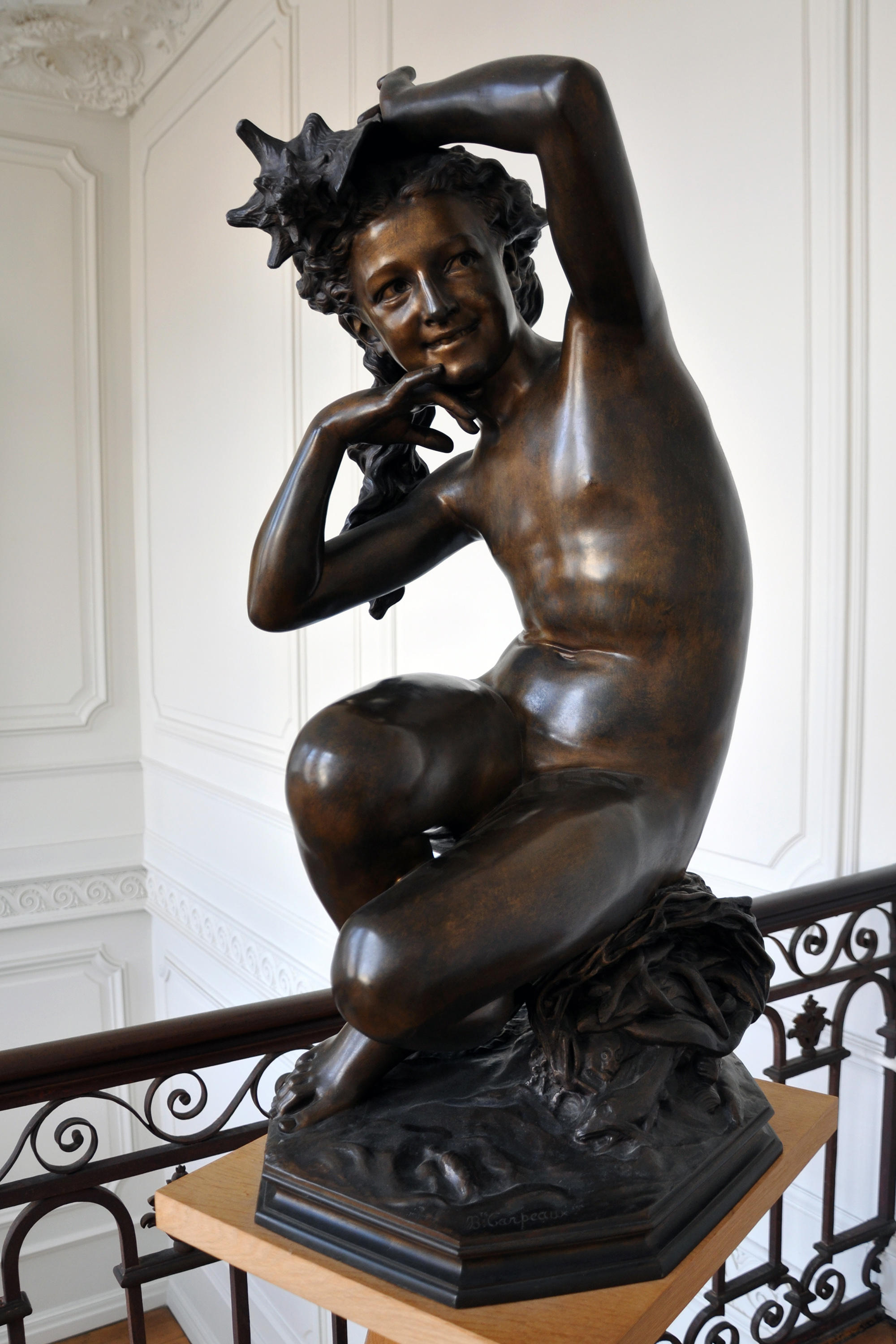 La jeune fille à la coquille, bronze, par Jean-Baptiste Carpeaux (Valenciennes 1827-Courbevoie 1875). Cette statue est le pendant,réalisé ensuite, du Pêcheur à la coquille; le visage est celui d'Anna Foucart. Musée des Beaux-Arts de Cambrai.